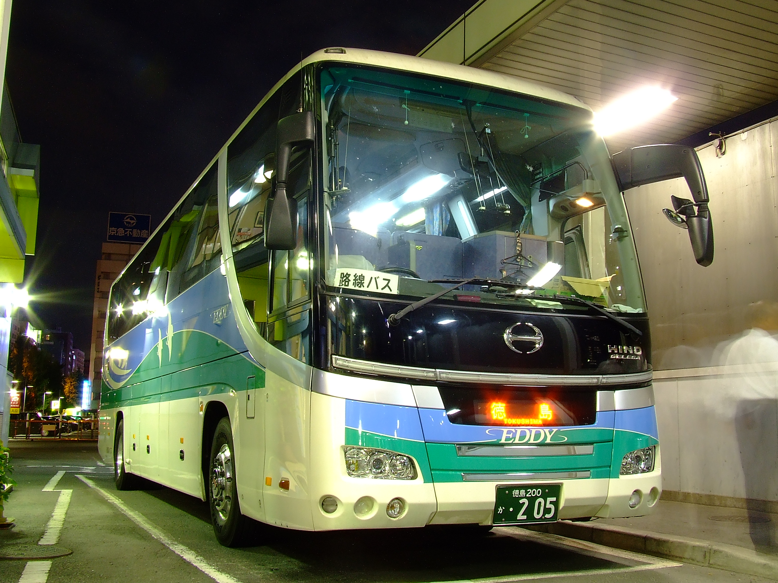 徳島バスの夜行高速バス「エディ号」品川バスターミナルにて